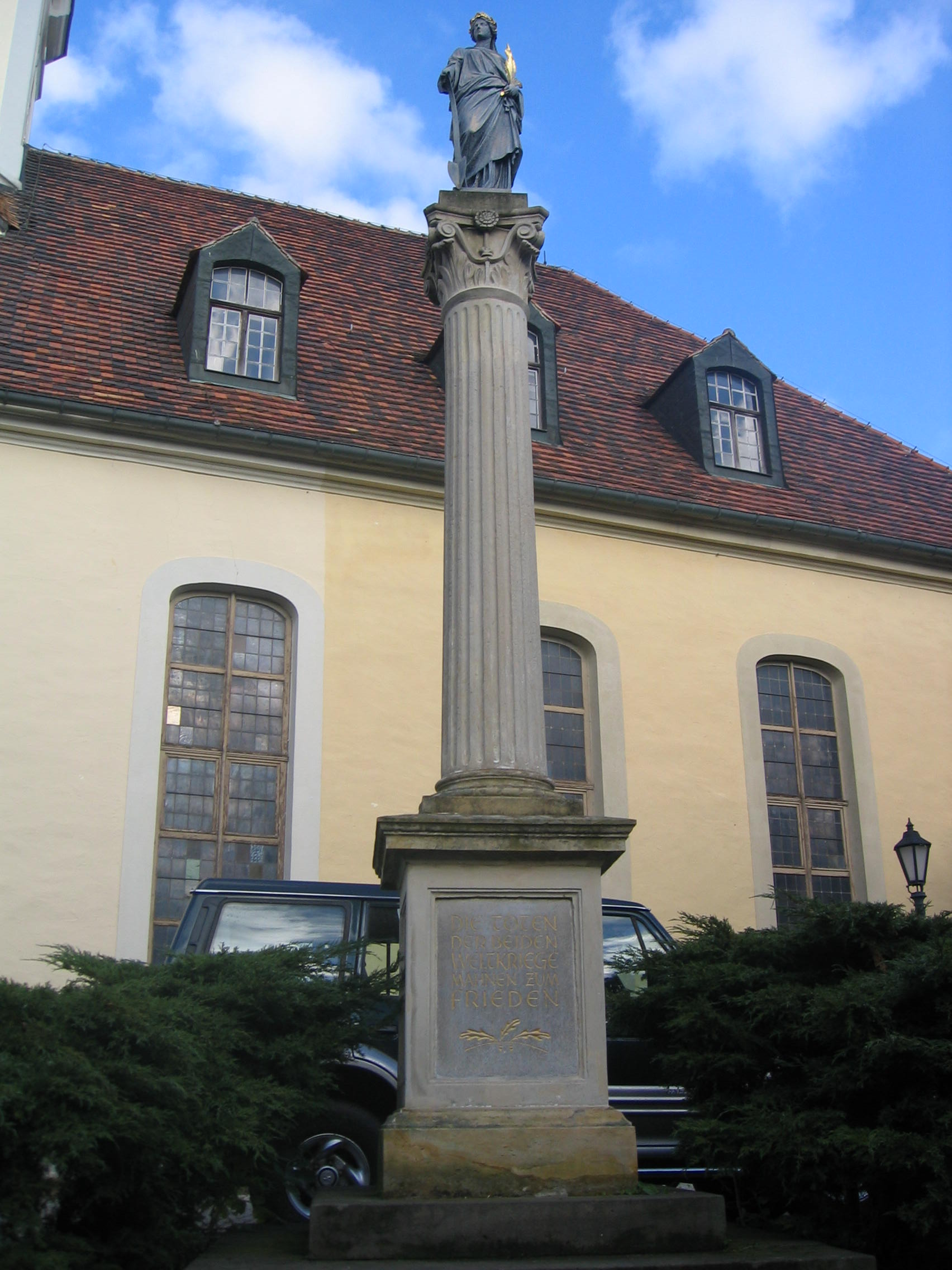 Germaniadenkmal in Ruhland (Baudenkmal, zwischen Kirchplatz und Bahnhofstraße); Säule mit Statue Vorderseite (Südseite)